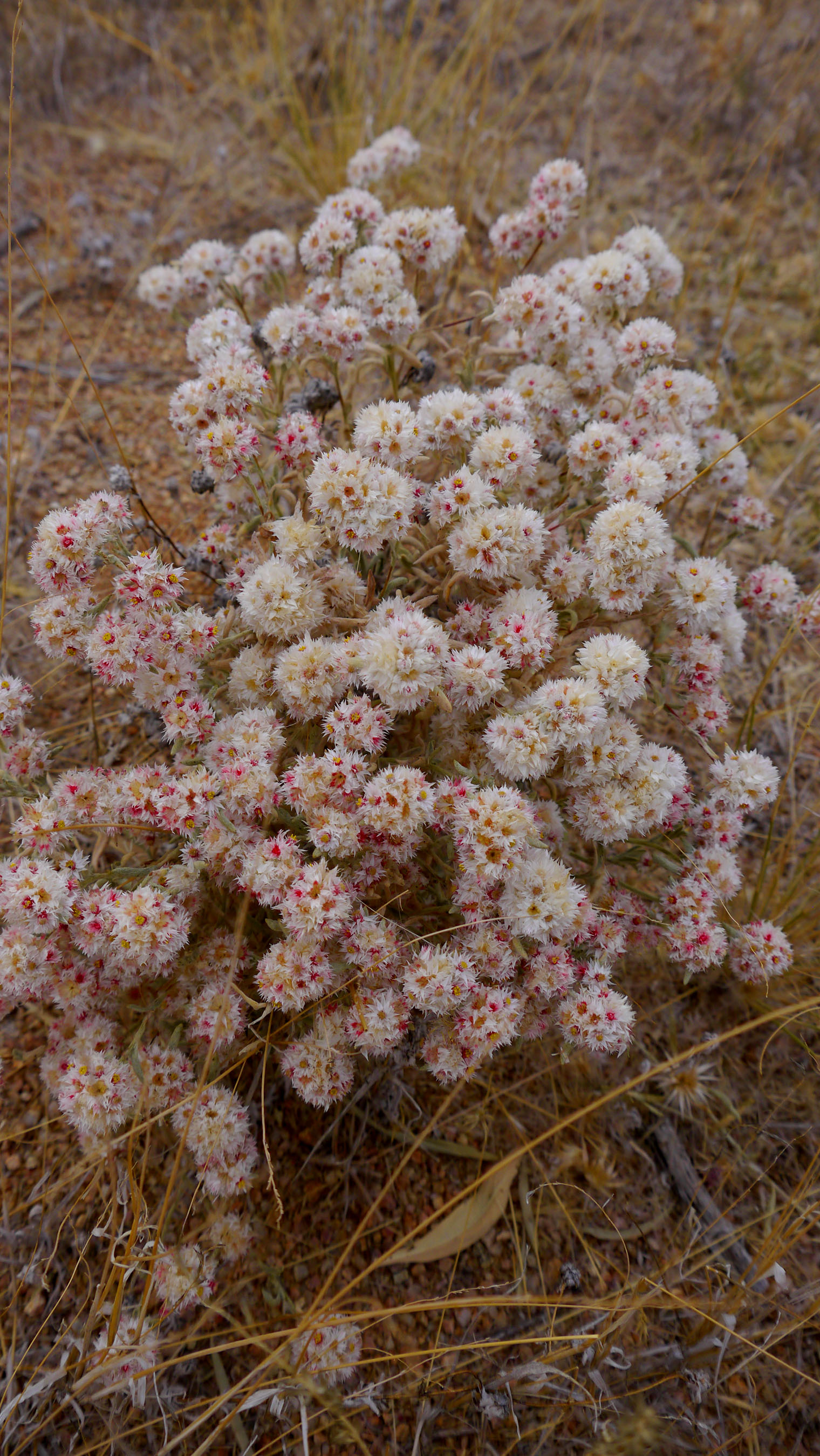 Helichrysum candolleanum en Sesriem (Namibia).